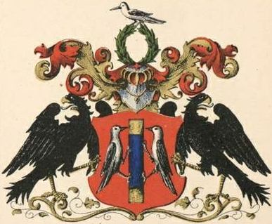 Friederici suguvõsa aadlivapp